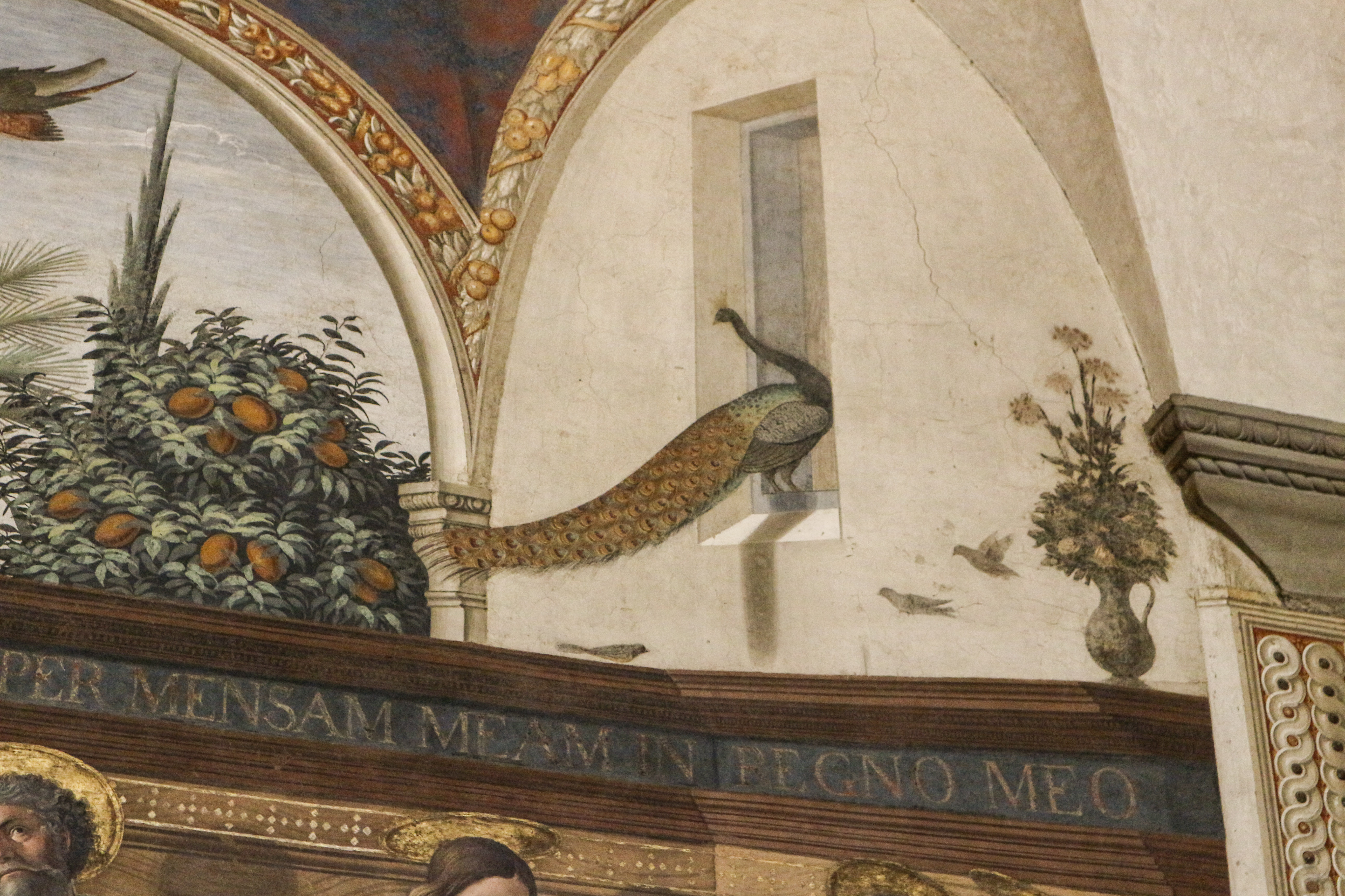 Dettaglio del pavone nel Cenacolo del Ghirlandaio, Firenze, Museo di San Marco